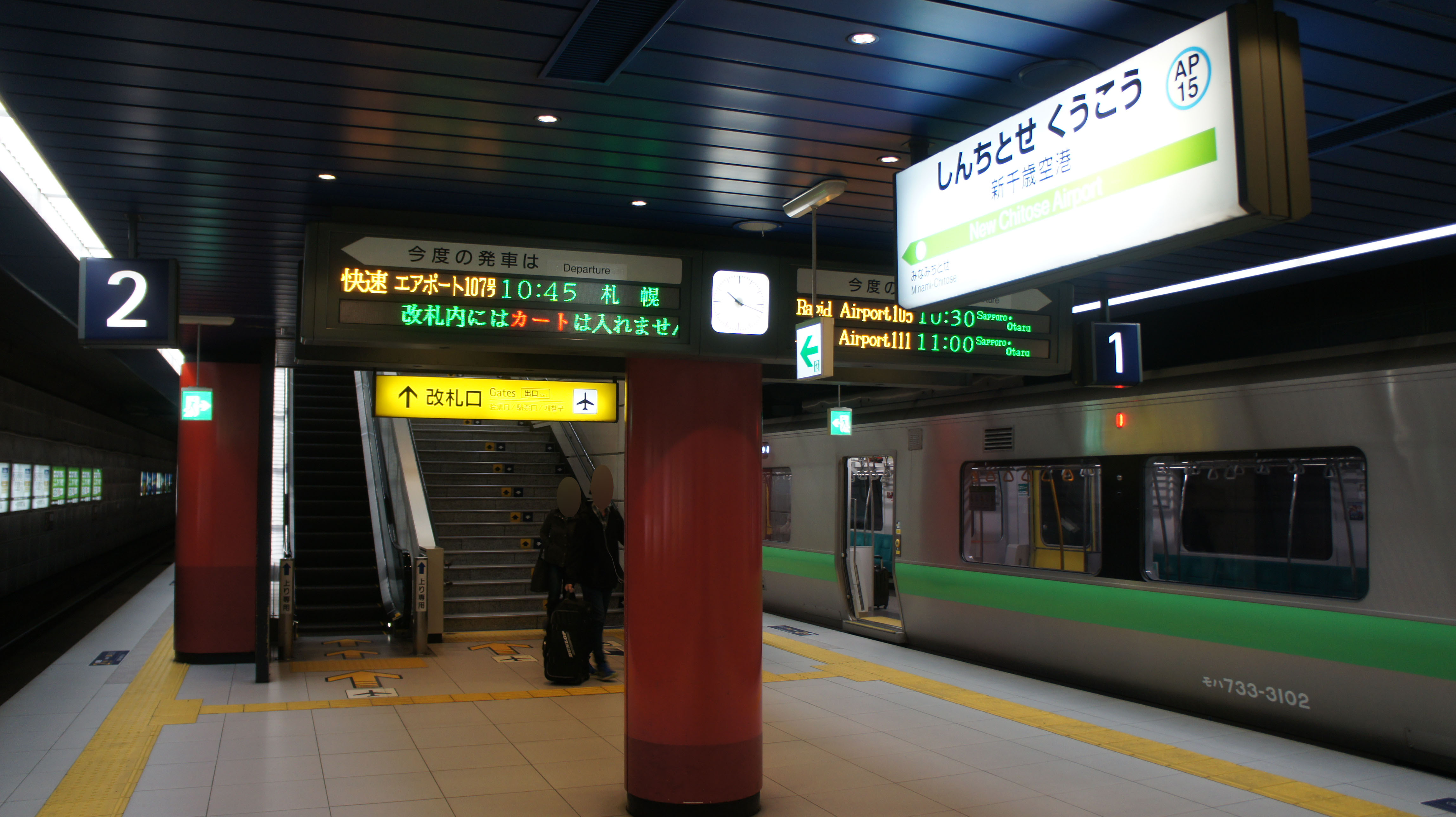 JR千歳線・新千歳空港駅のホーム Sony NEX-3